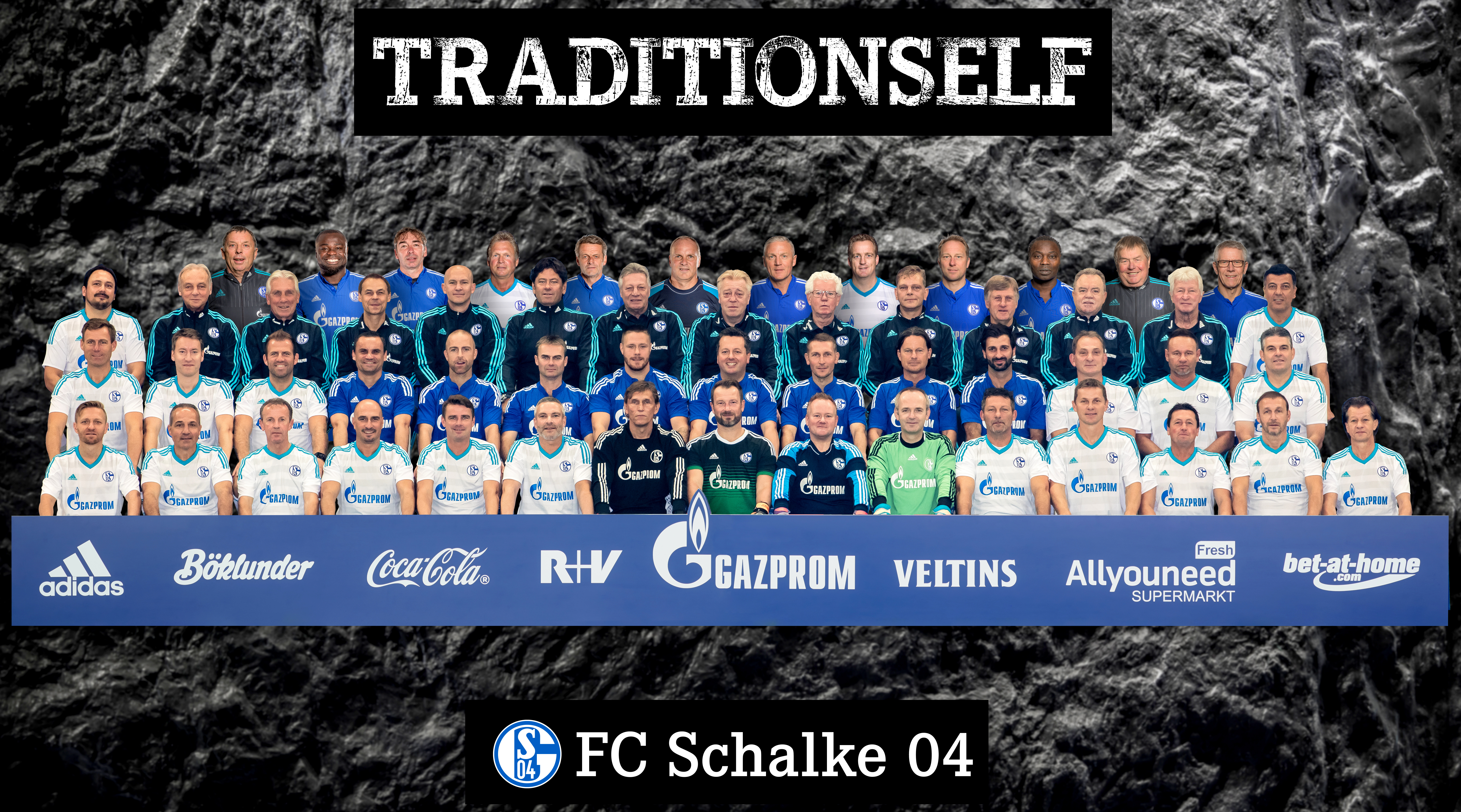 Mannschaftsposter der Traditionself von Schalke 04